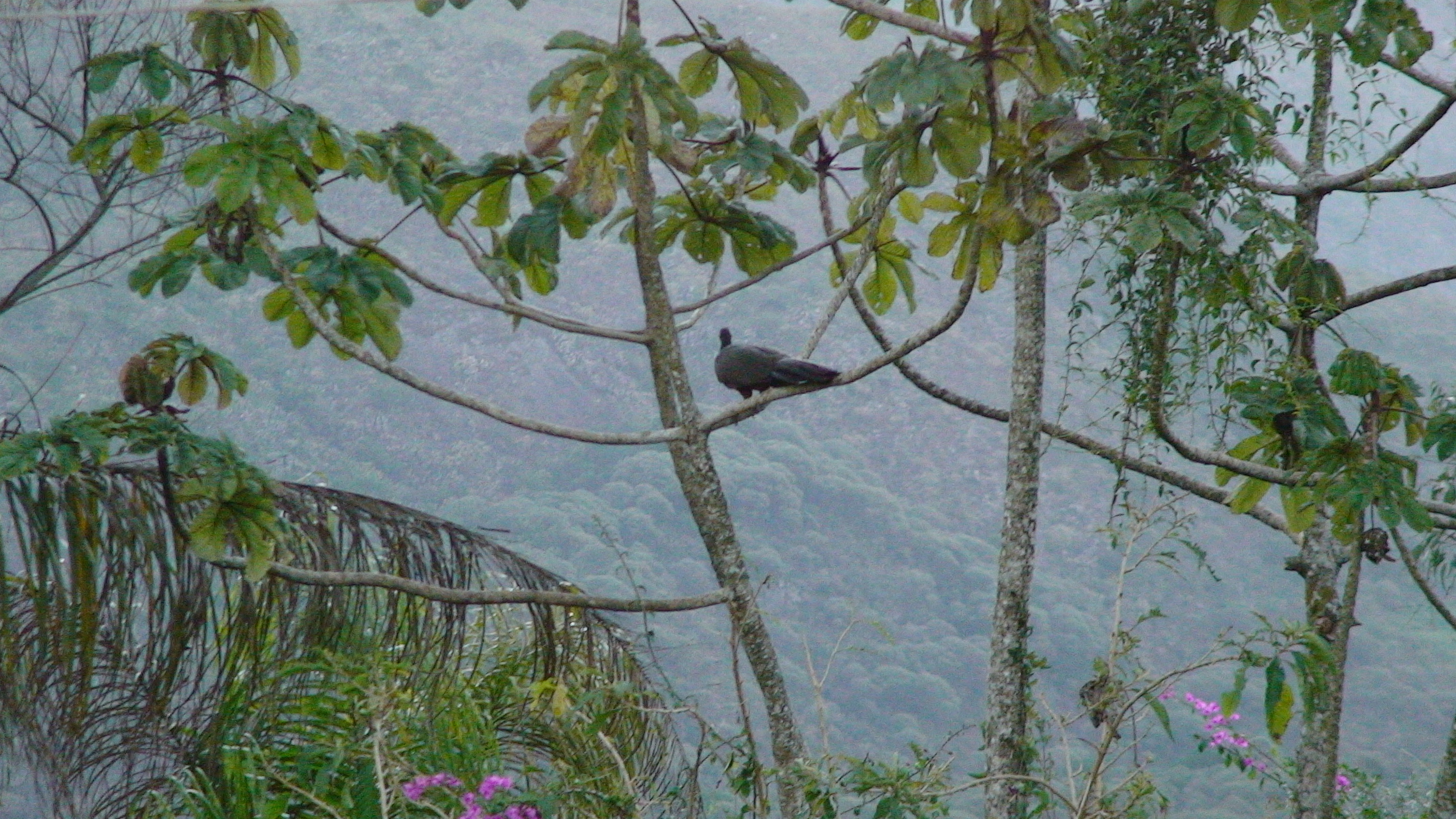 Malhela jakuo sur branĉo de Blanka cekropio Cecropia hololeuca en Brazilo.